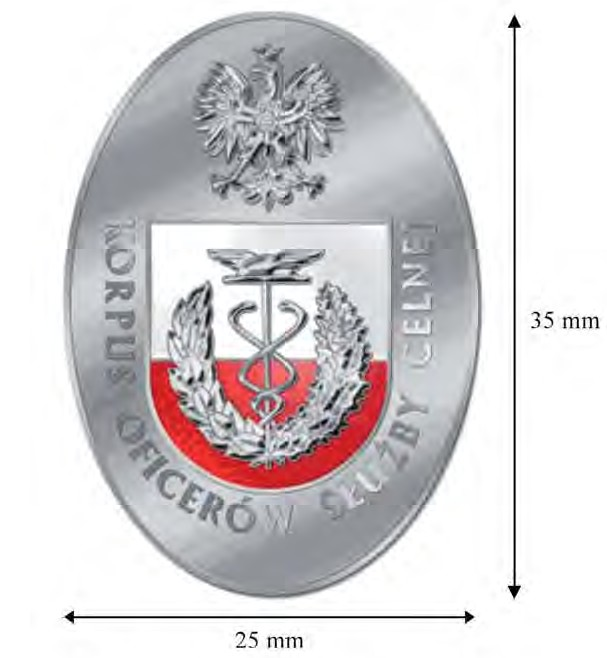 Oznaka korpusu oficerów Służby Celnej